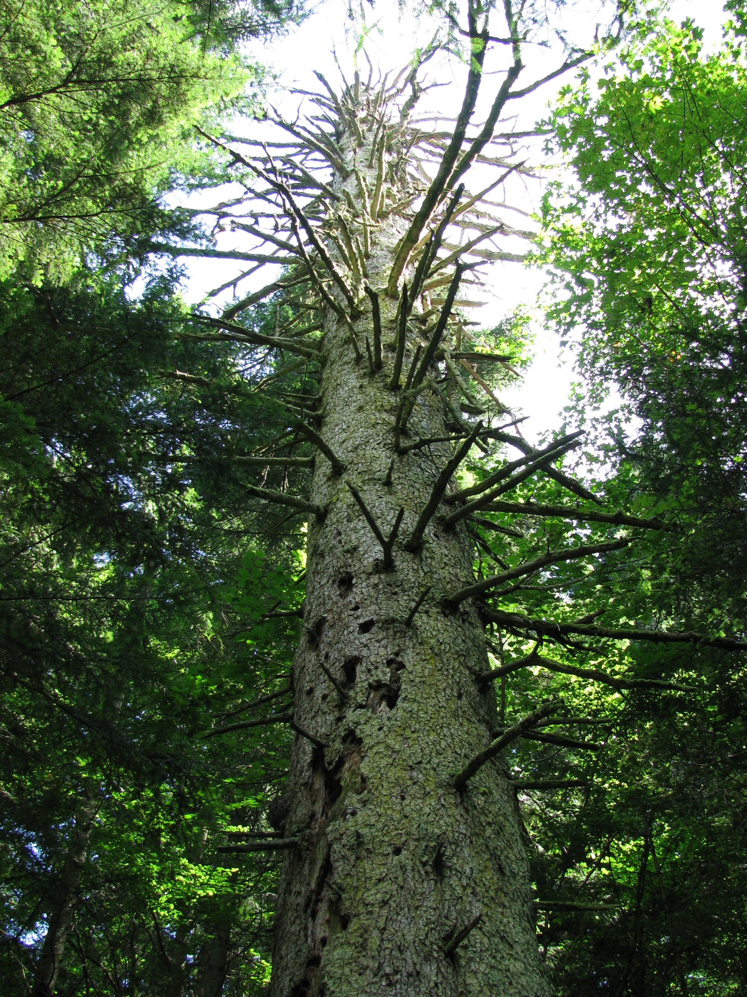 Maroltova jelka